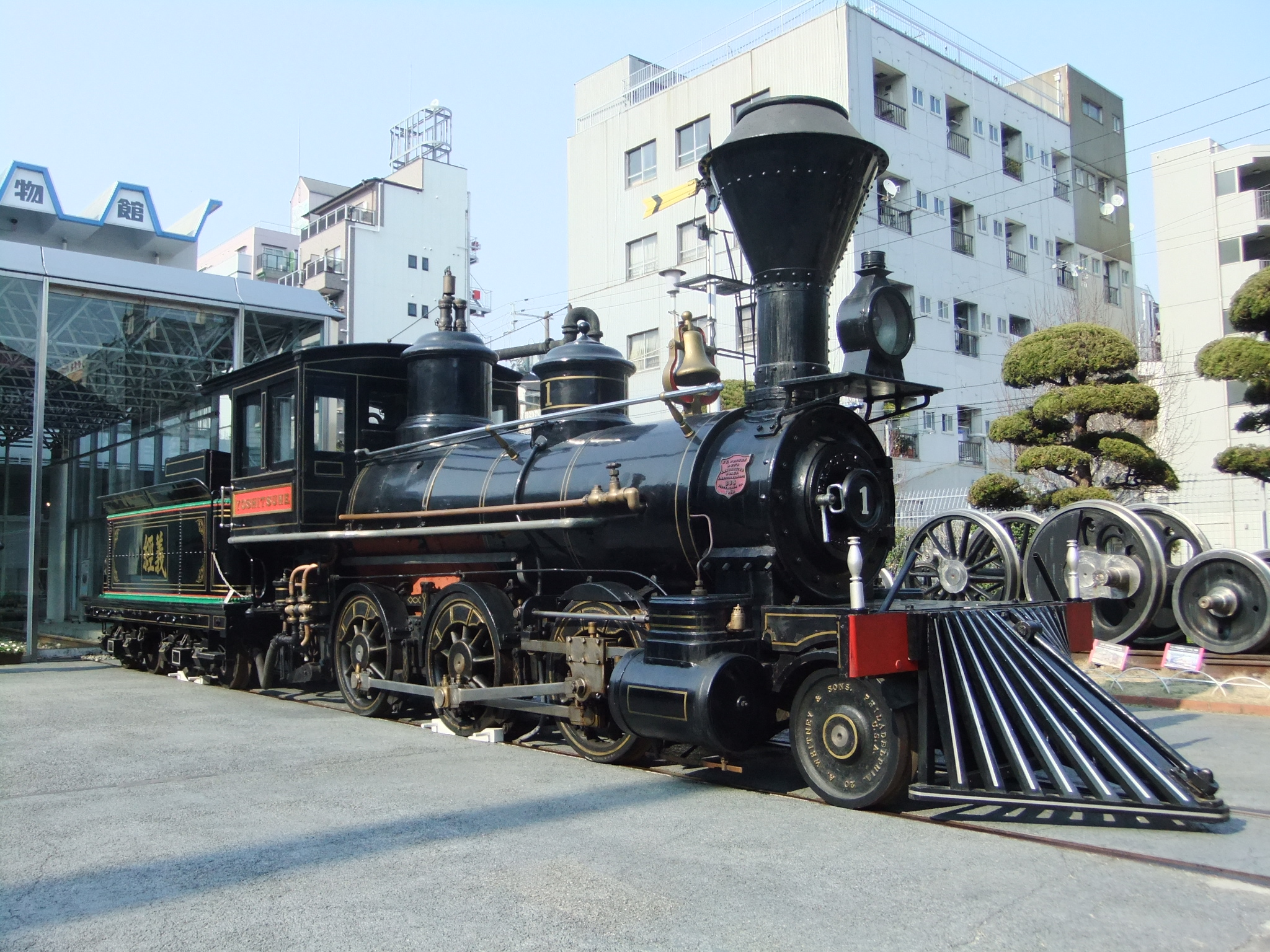 7100形7105 義経号 交通科学博物館